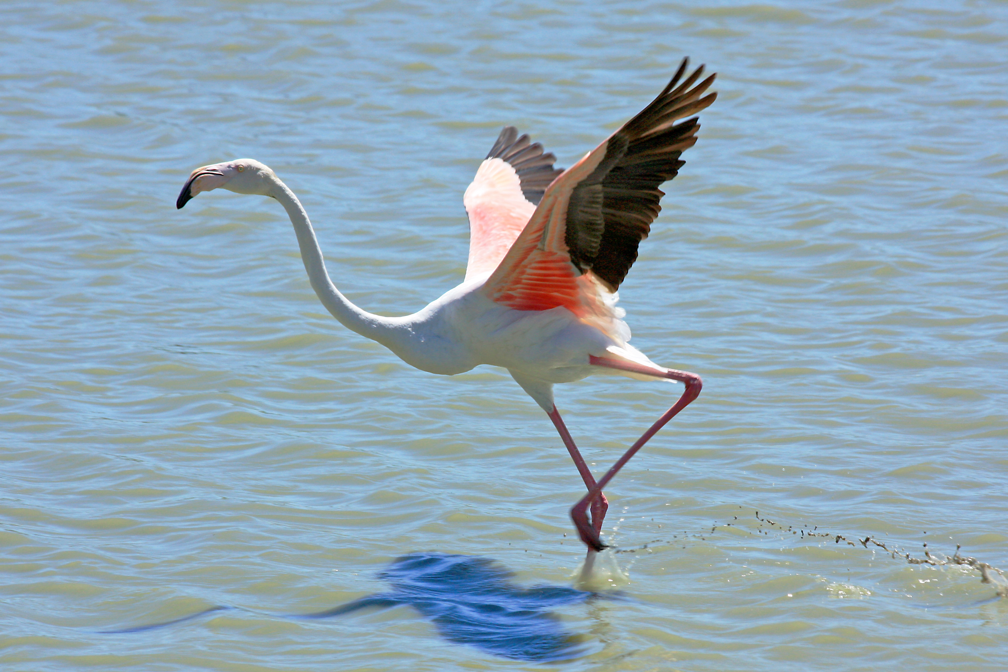 Flamant rose Phoenicopterus roseus de Camargue à l'envol